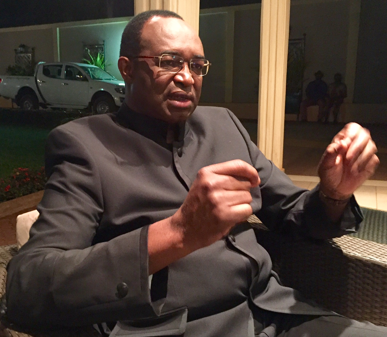 Anicet Georges Dologuele, candidat aux élections en RCA Deux anciens premiers ministres, Anicet Georges Dologuélé et Faustin Archange Touadéra, sont arrivés en tête au premier tour de la présidentielle en Centrafrique, selon des résultats provisoires annoncés jeudi par l'Autorité nationale des élections (ANE).